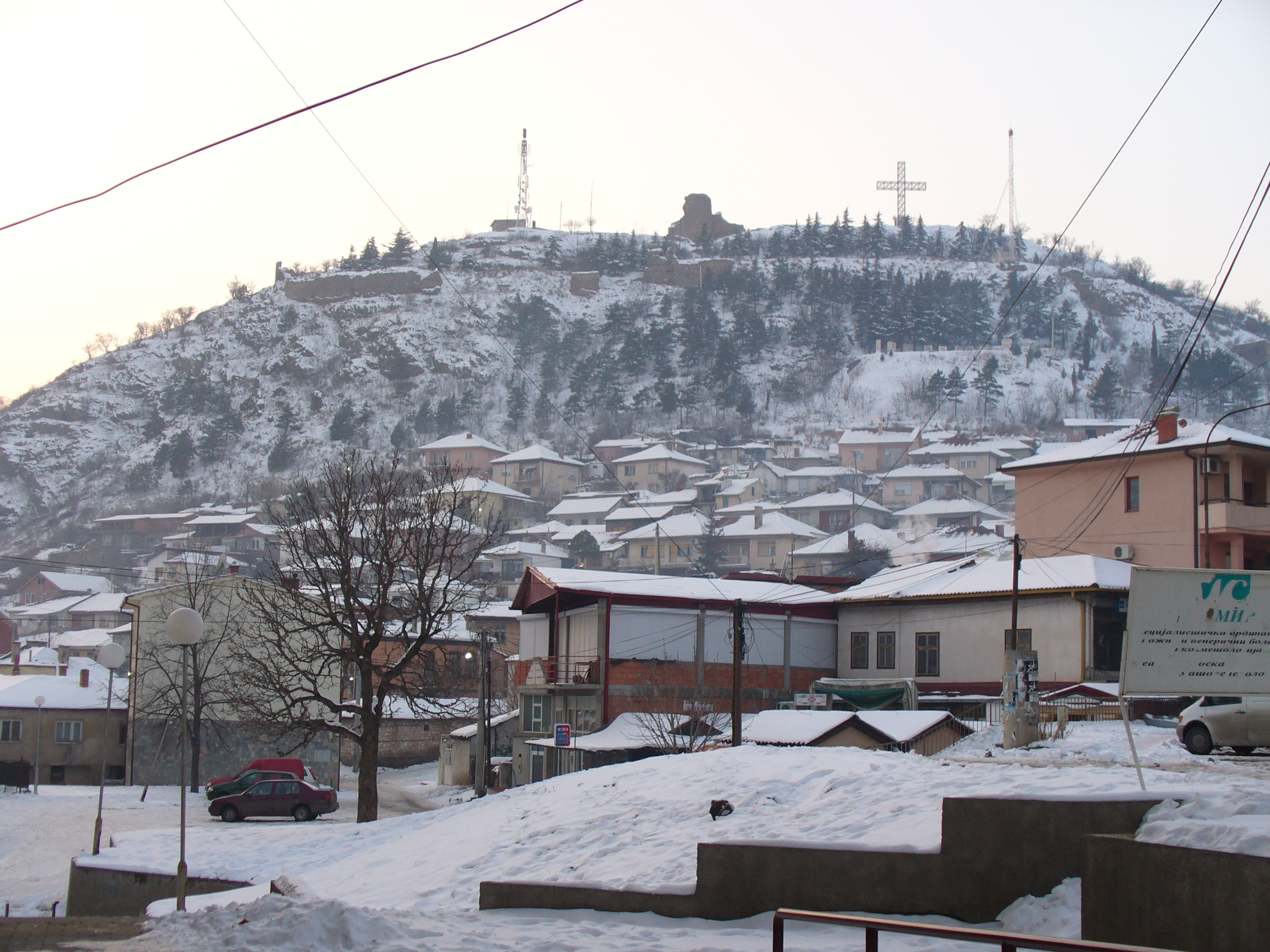 Щип през зимата.